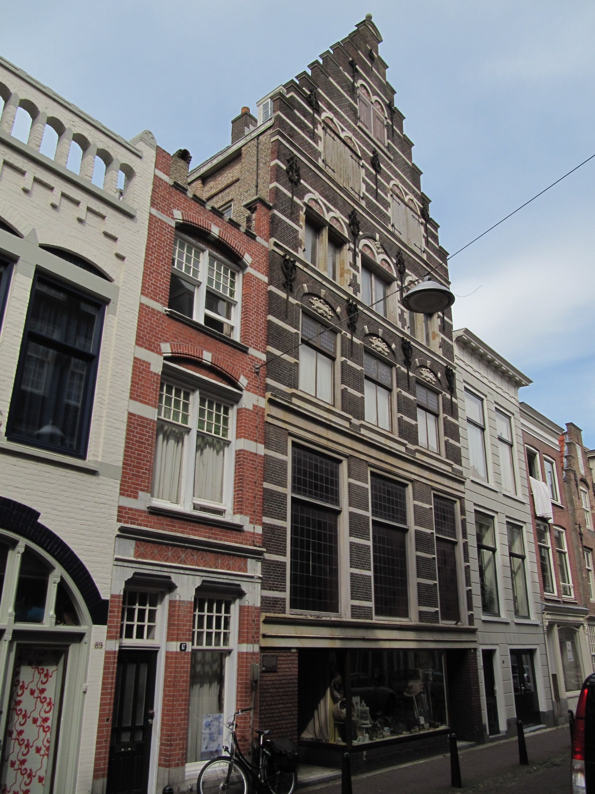 RM13748 Dordrecht - Voorstraat 83 (foto 1).jpg